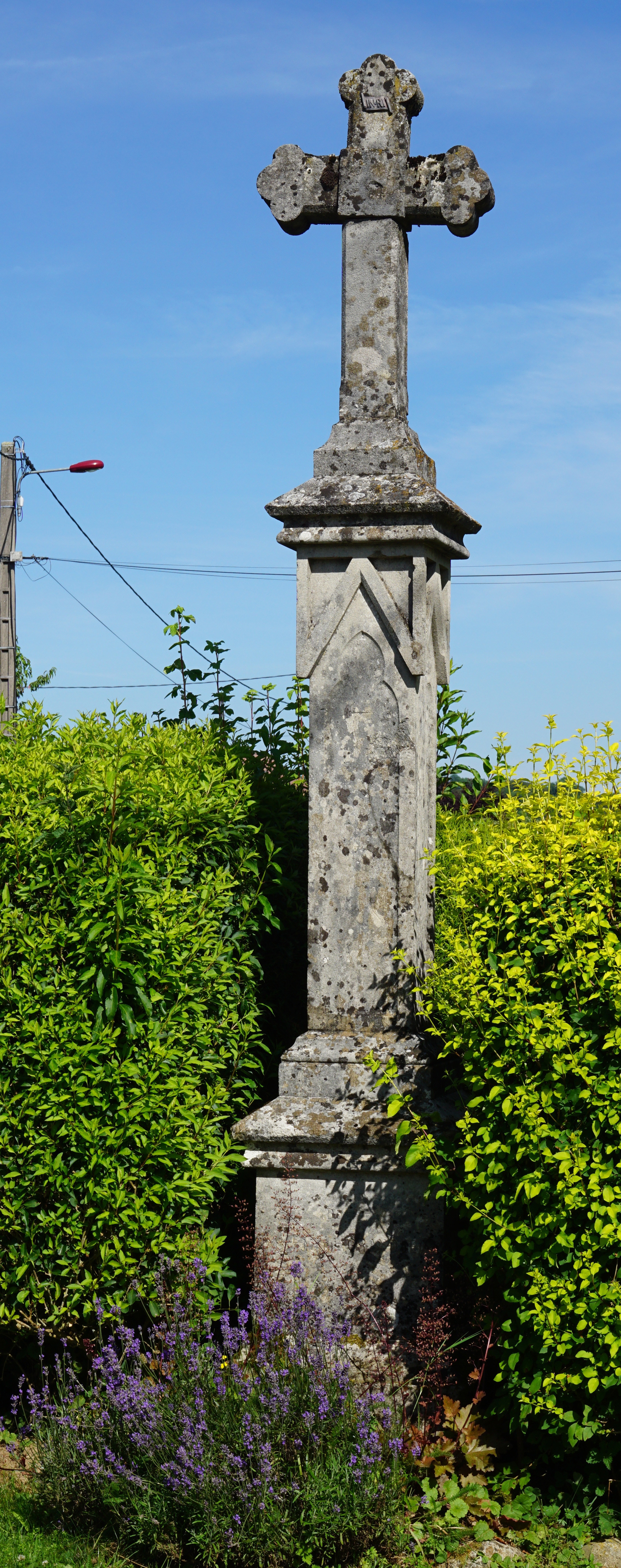 Croix de Saint-Ferjeux.